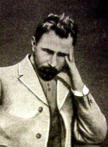 Бывший священник Георгий Аполлонович Гапон (1870-1906)